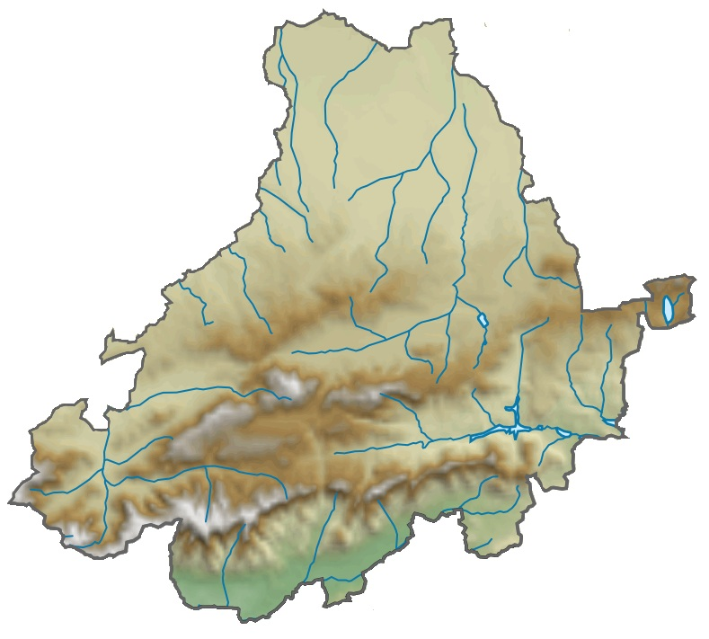 Mapa de la provincia de la provincia de Ávila, Castilla y León, España.